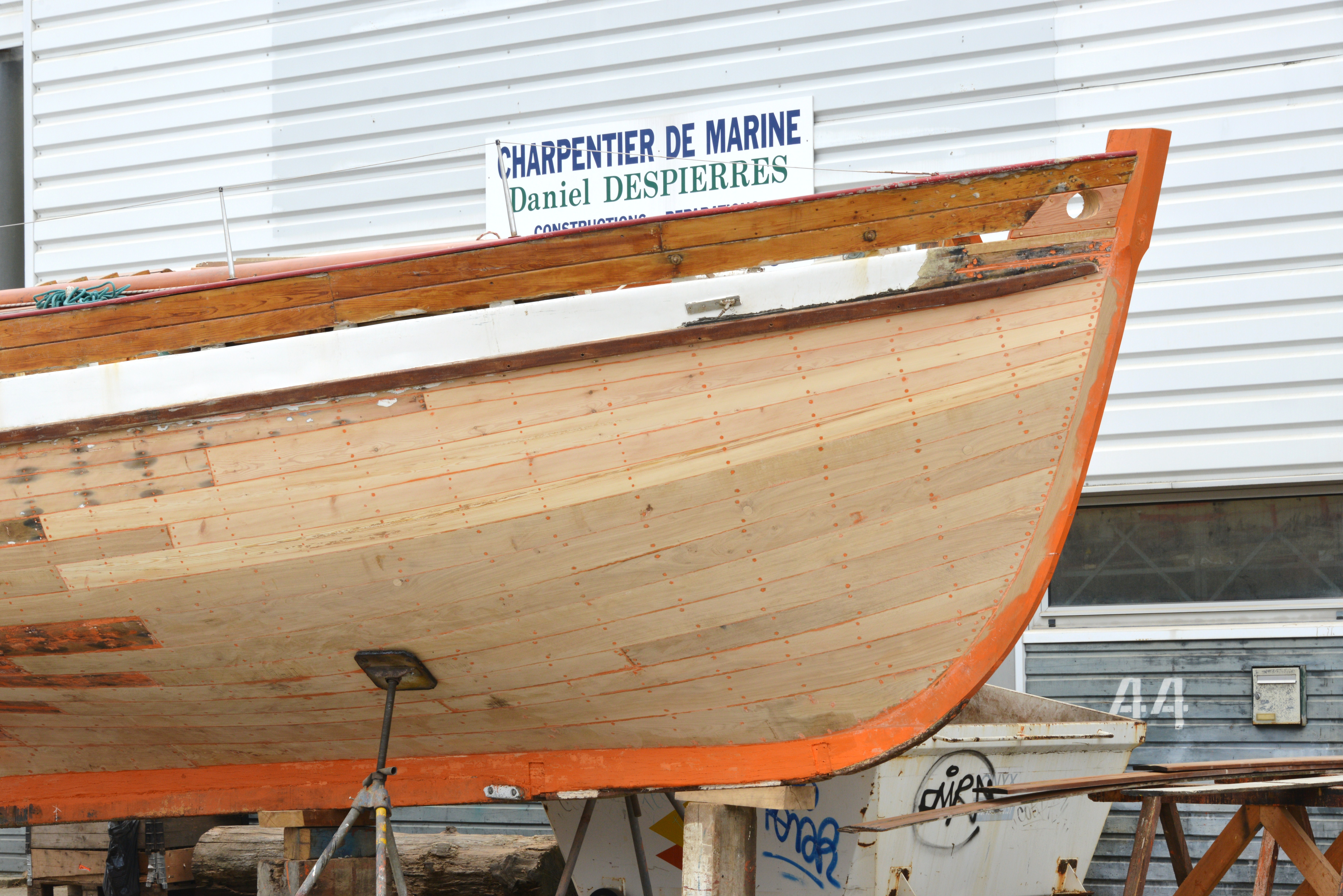 La coque en bois du dundee de plaisance « Sétis » (« SETIS ») restaurée mais encore sans peinture. Plateau nautique de la Ville en Bois. Le « SETIS » a été construit en 1936. La Rochelle, Charente-Maritime, France.